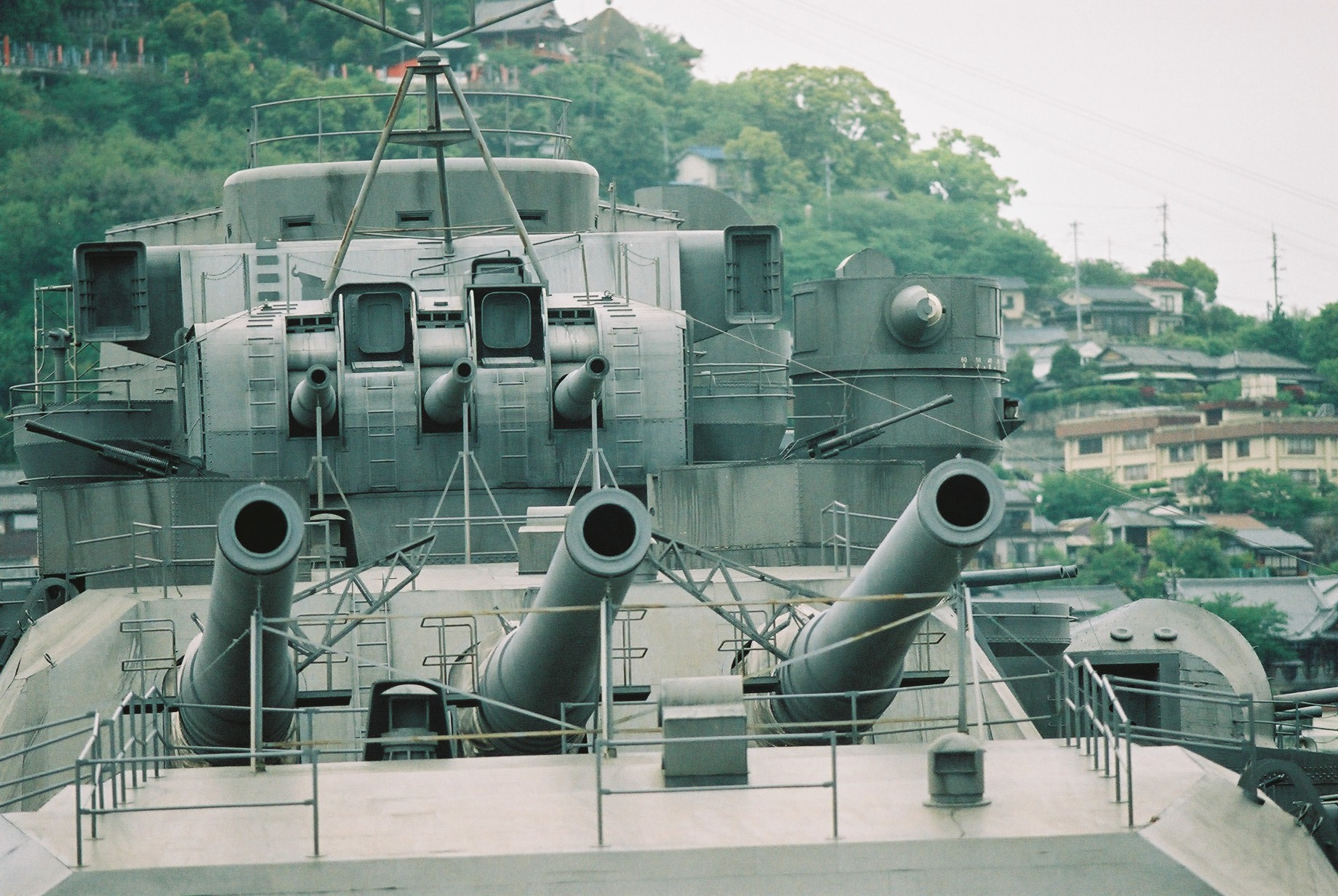 尾道に設けられた、大和ロケセット。